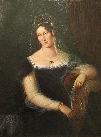 Анна Михайловна Хилкова (1799—1868), в первом браке за С. Г. Щербатовым, во втором - за А. Н. Толстым.